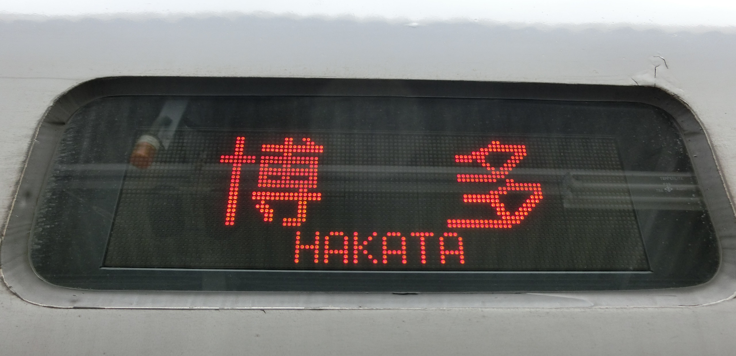 500系新幹線の博多南線の博多行きLED表示